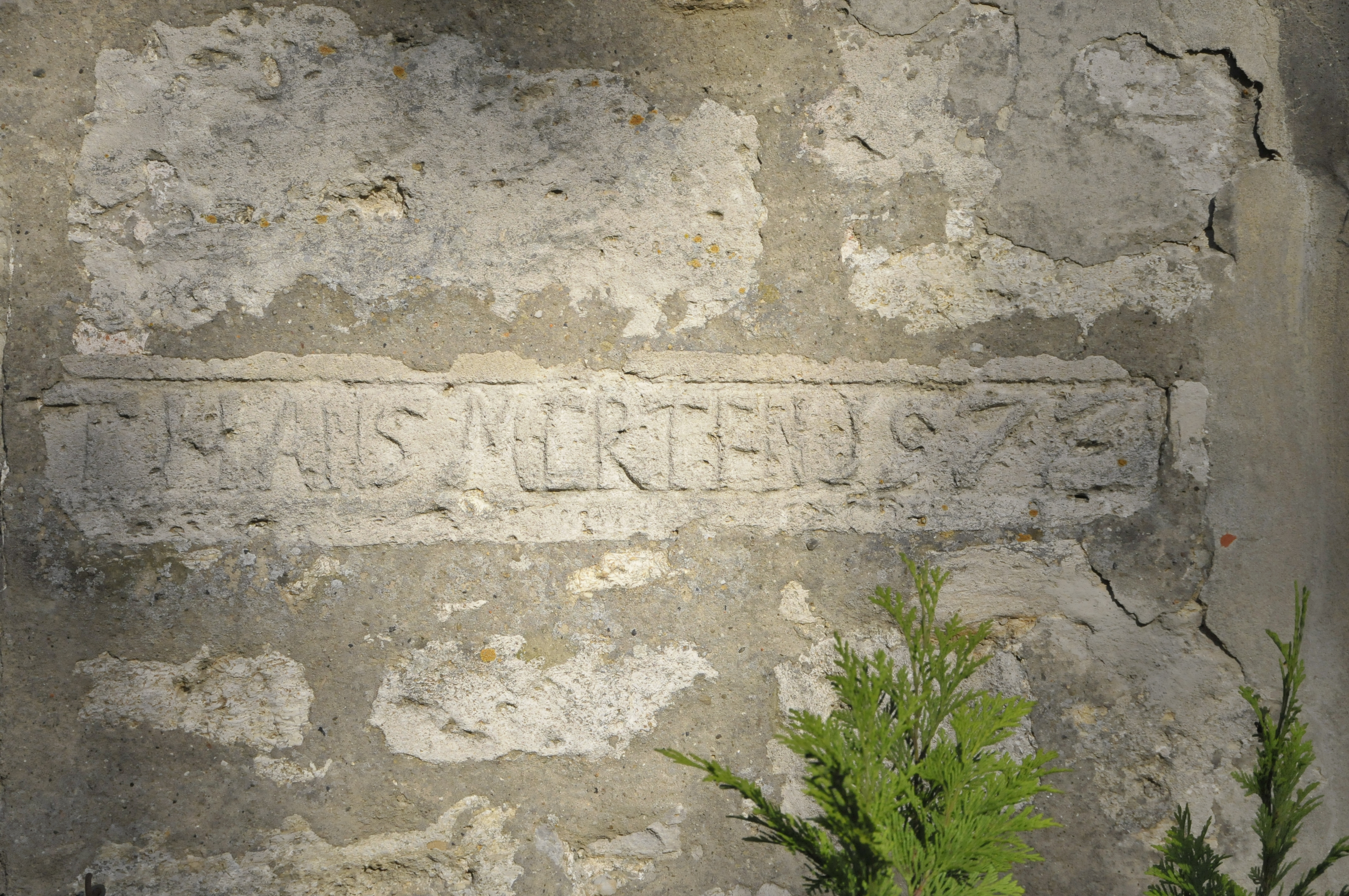 Milda, Kirchmauerstein